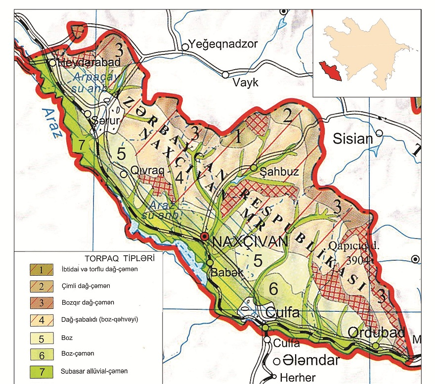 Orta Araz təbii vilayətinin torpaq örtüyü.